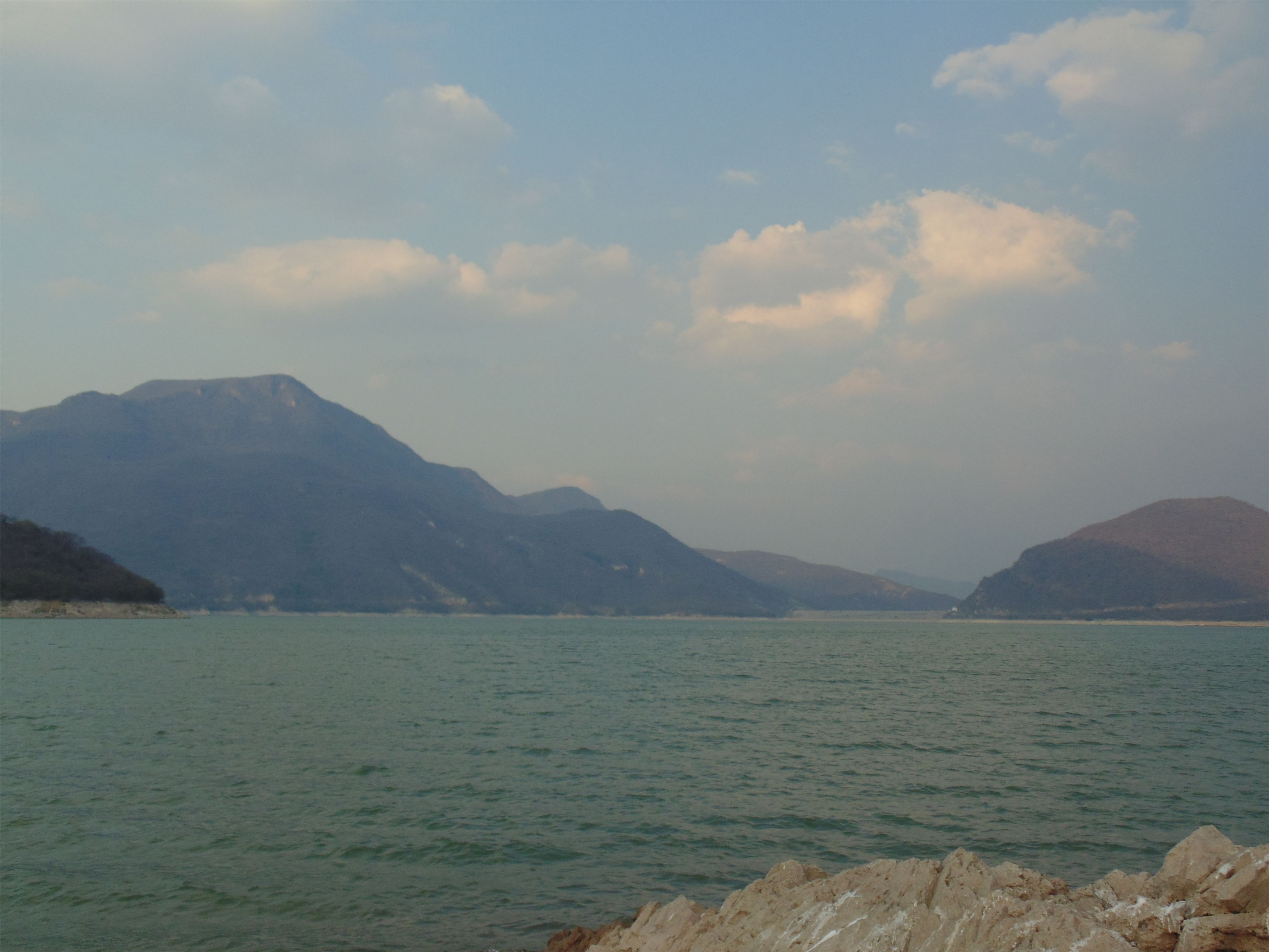 Vista desde la orilla del lago Benito Juárez de la presa homónima. Este lago es el hábitat de muchas especies marinas, de las que sobresale la mojarra, que es usada en múltiples platillos de la región. Fotografía: ©JB Photography.